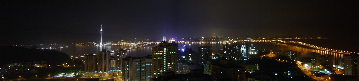 Macau (2004)